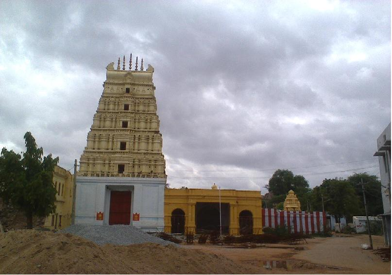 కోటలోని చెన్నకేశవాలయం